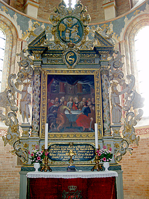 Altertavlen i St. Bendts Kirke , Ringsted, Denmark